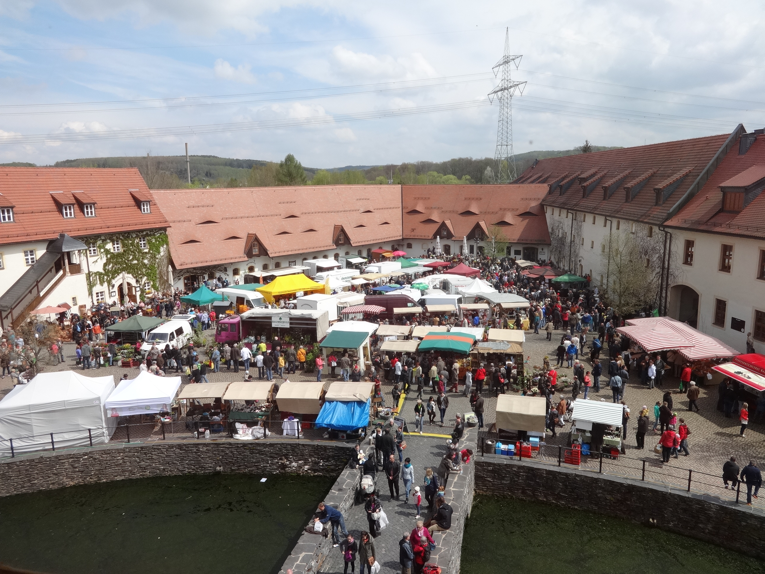 Hof an der Ostseite von Schloss Klaffenbach in Chemnitz-Klaffenbach; Denkmalnummer 09205018